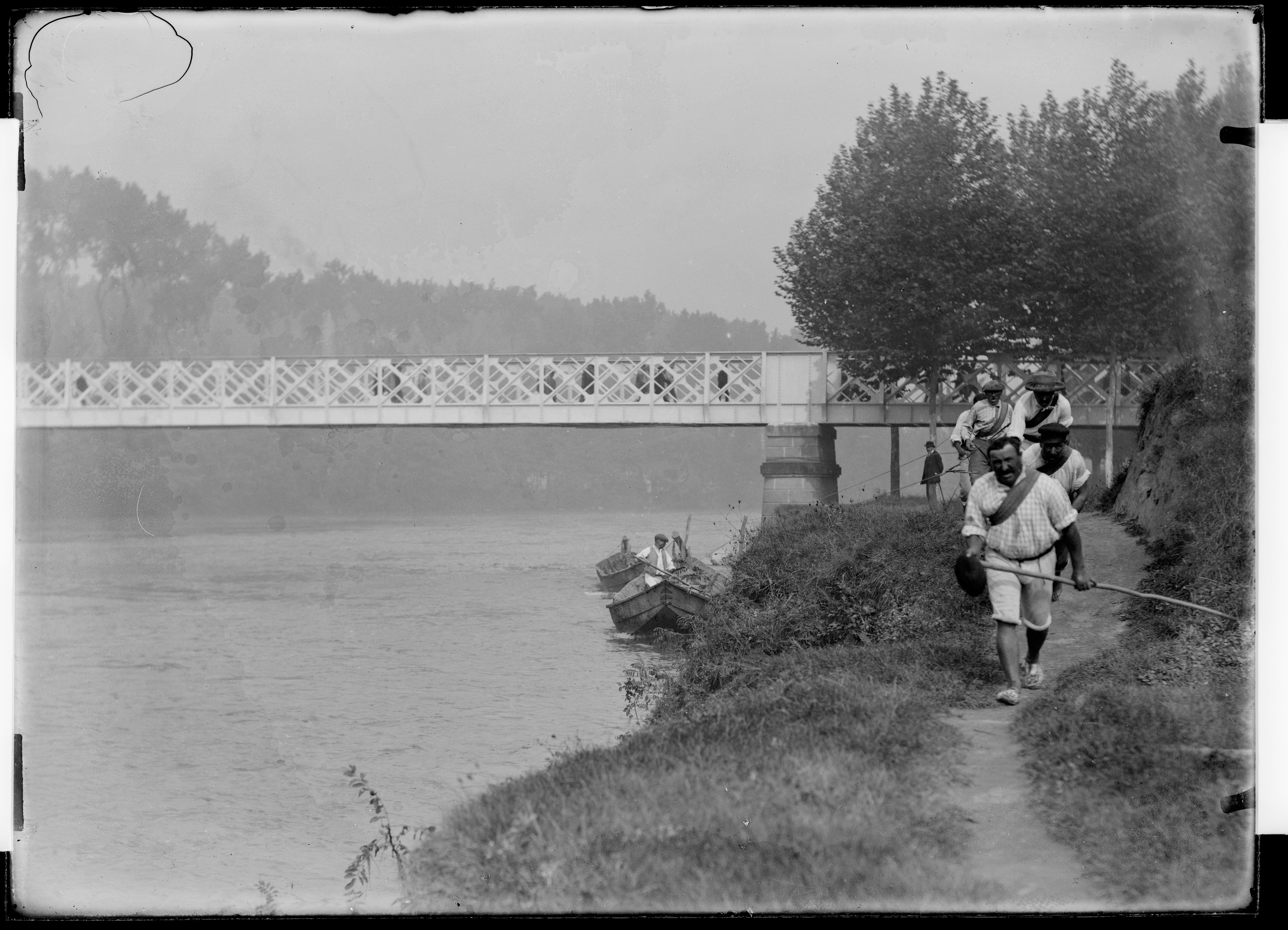 plaque négative au gélatino-bromure d'argent format 13x18cm. Sans inscription ni mention d'auteur. plaque endommagée renforcée par une contre-plaque